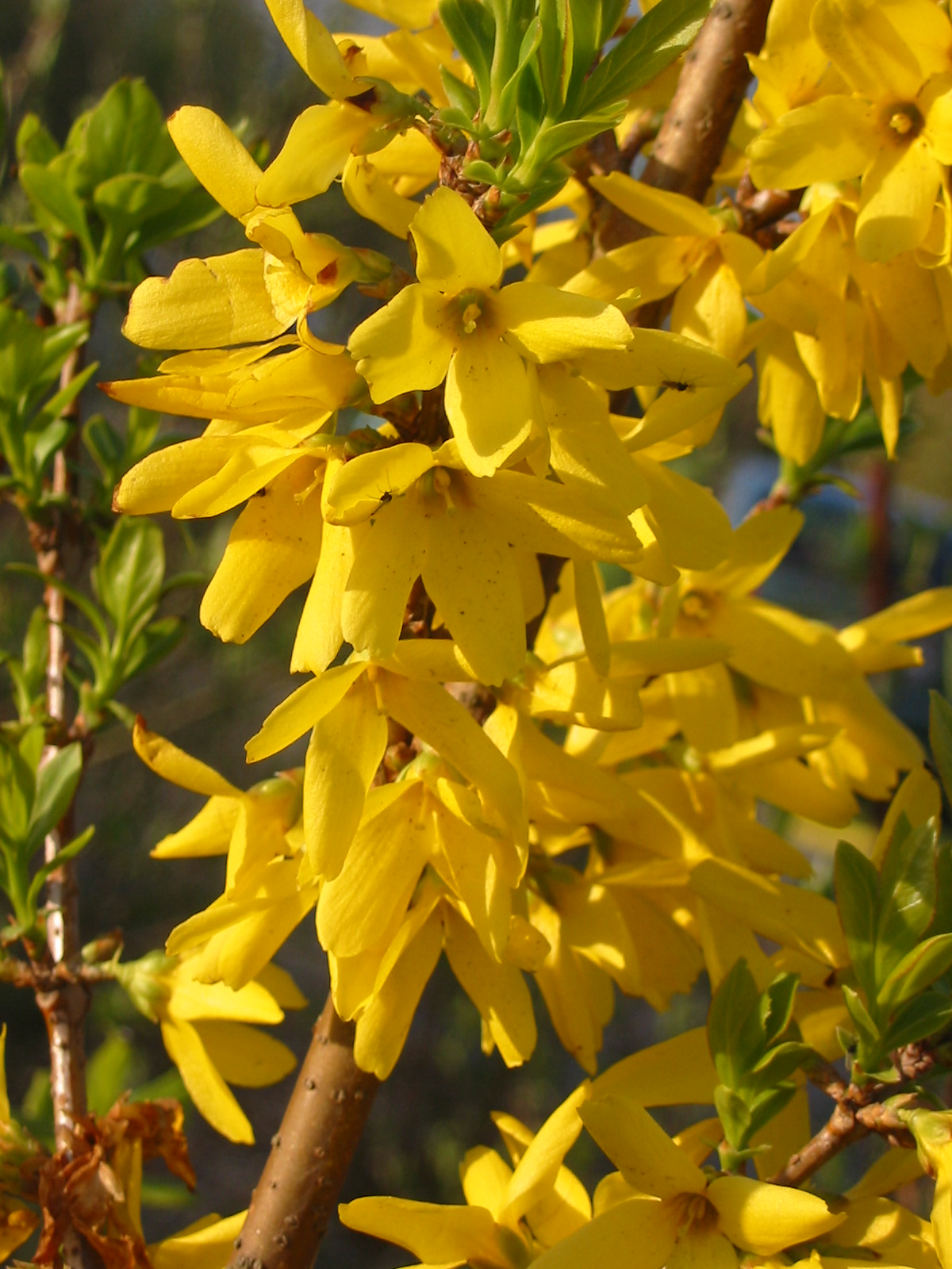 Forsythia